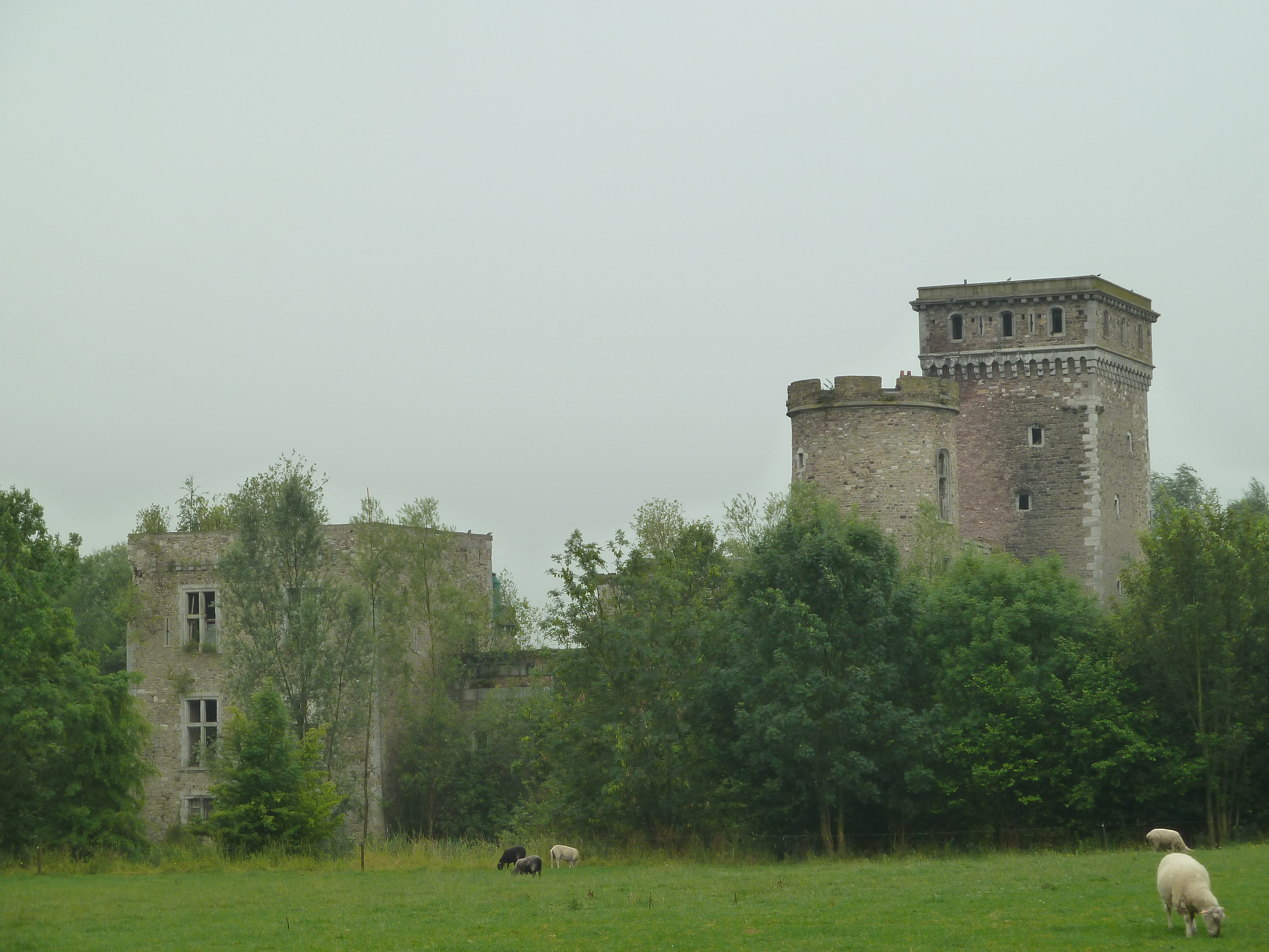 Château de Seraing-le-château, Verlaine, Belgique